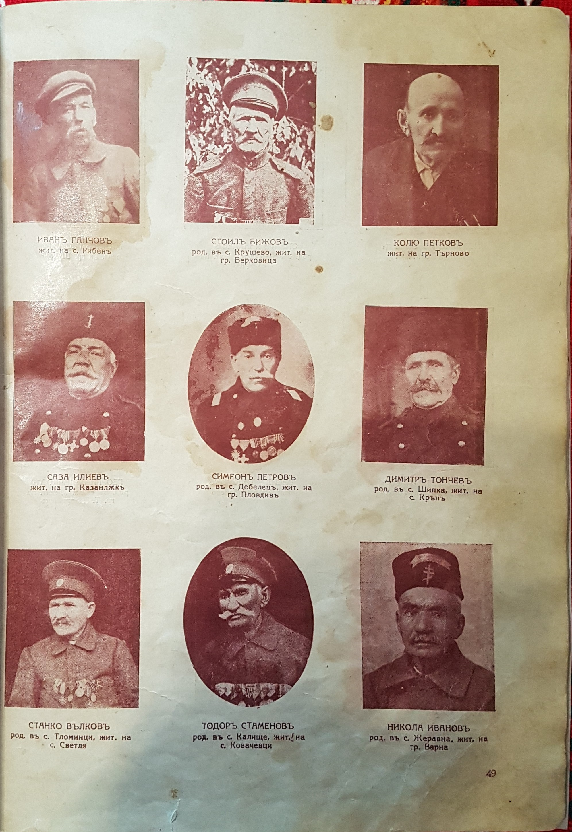 Алманах на българското опълчение, стр. 49